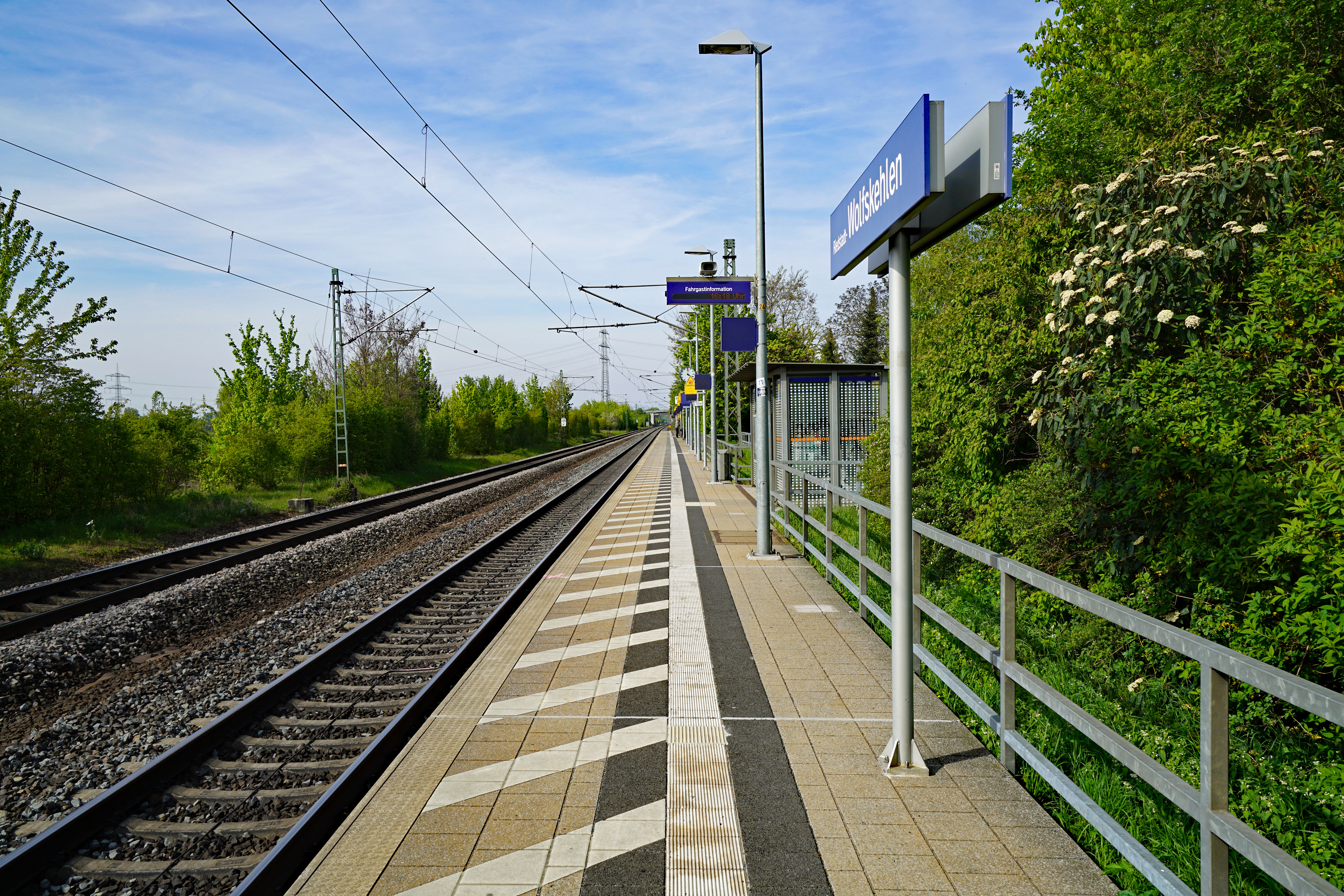 Der Haltepunkt Riedstadt-Wolfskehlen auf der Gemarkung der Stadt Riedstadt in Hessen